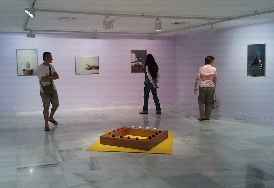 El arte abstracto de Gorchov y el mundo conceptual de Hidalgo se dan cita a partir de esta noche en el Centro Atlántico de Arte Moderno (CAAM). Las obras, que se podrán ver desde las 20.30 horas, aparecen bajo los títulos Desde Ayacata (1997-2011), lugar de residencia de Hidalgo, y Donde se oculta el alma, del norteamericano Ron Gorchov. Larry Álvarez, consejero de Cultura, señaló "que es un placer poder tener las obras de estos consagrados artistas colgadas en este museo". Desde Ayacata es la tercera exposición individual en el CAAM de Juan Hidalgo, lo que lo convierte en el único artista con ese logro. Además, se da el caso de que es la primera vez en España, y la primera de carácter individual en Europa, que realiza Ron Gorchov. El abstraccionismo de Gorchov y el arte conceptual de Juan Hidalgo los convierte en dos de los máximos exponentes de estas tendencias vanguardistas en el siglo XX. Una exposición de cerca de 100 obras en las que, por vez primera, se exhibirán 23 acuarelas de Gorchov, que él califica como "íntimas y personales". Ray Smith, comisario de Ron Gorchov, señaló que "cuando el director del CAAM, Omar Pascual, me solicitó que escogiera un artista, no dudé en elegir a Ron. Él traspasa la Escuela de Nueva York y la abstracción contemporánea del siglo XX de Europa". En relación a ello, Smith explicó que la obra de Ron, aunque se enmarque en el siglo pasado, tiene ciertas pinceladas que recuerdan a las imágenes actuales. Por su parte, Carlos Astiárraga, comisario de Juan Hidalgo, dijo que, "esta exposición es la última retrospectiva de la vida del artista desde que se trasladó a la su Isla natal". Una obra que se caracteriza por su temática, en la que se incluyen fotografías de sí mismo, objetos y cosas aparentemente no importantes, en las que además se ha dejado espacio para el homenaje a artistas sobre los que ha girado la obra del fundador del grupo ZAJ. Fuentes